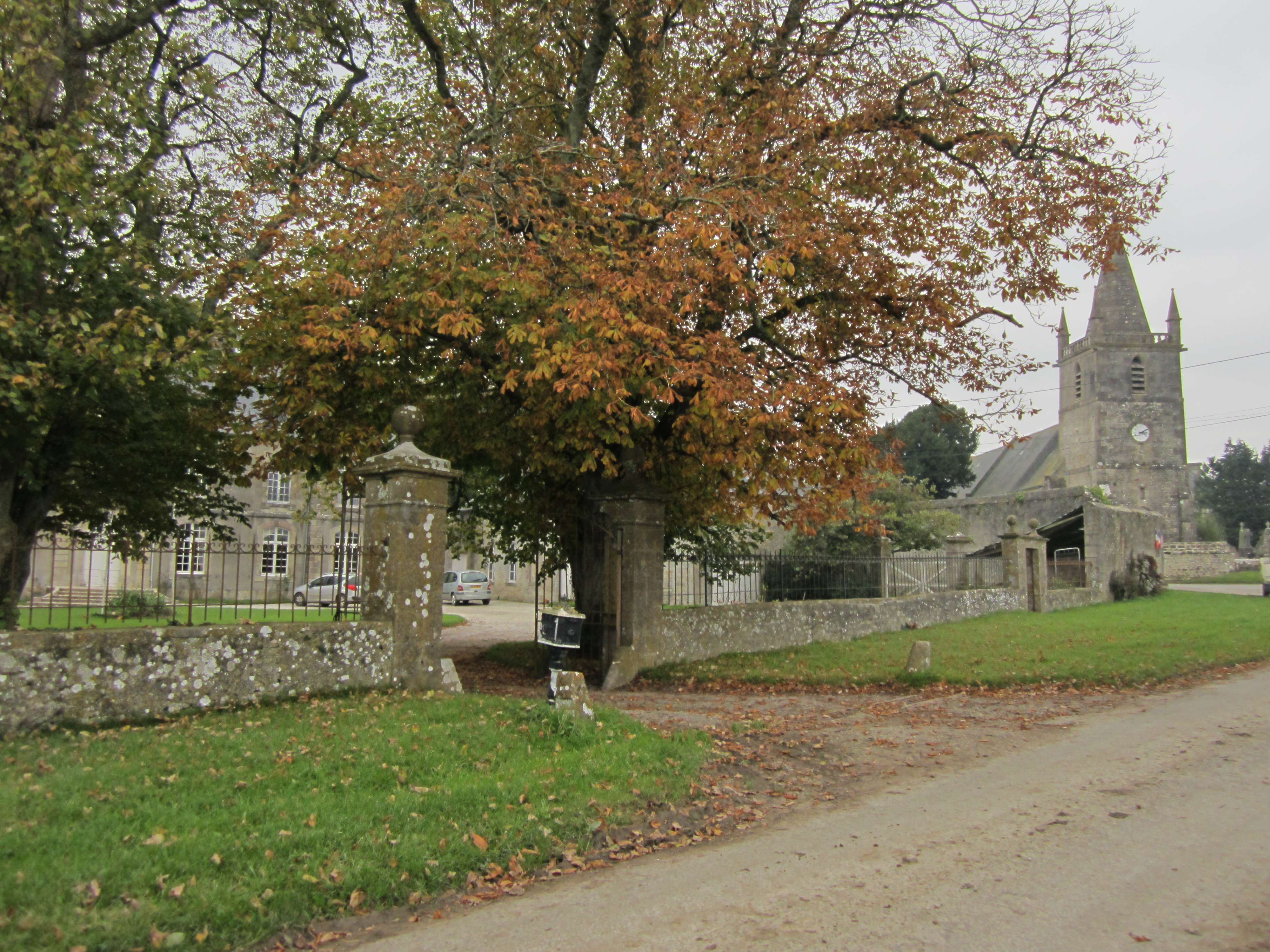 Neuville-au-Plain, Manche